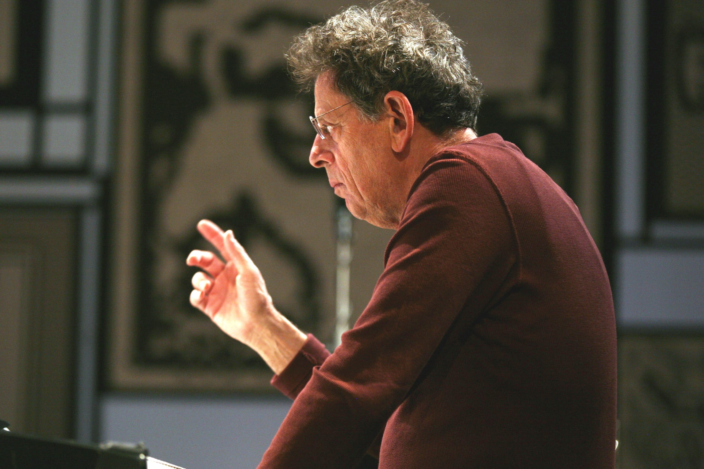 Milano, Teatro degli Arcimboldi. Philip Glass - Book of Longing. Immagini di Leonard Cohen ©Lelli e Masotti